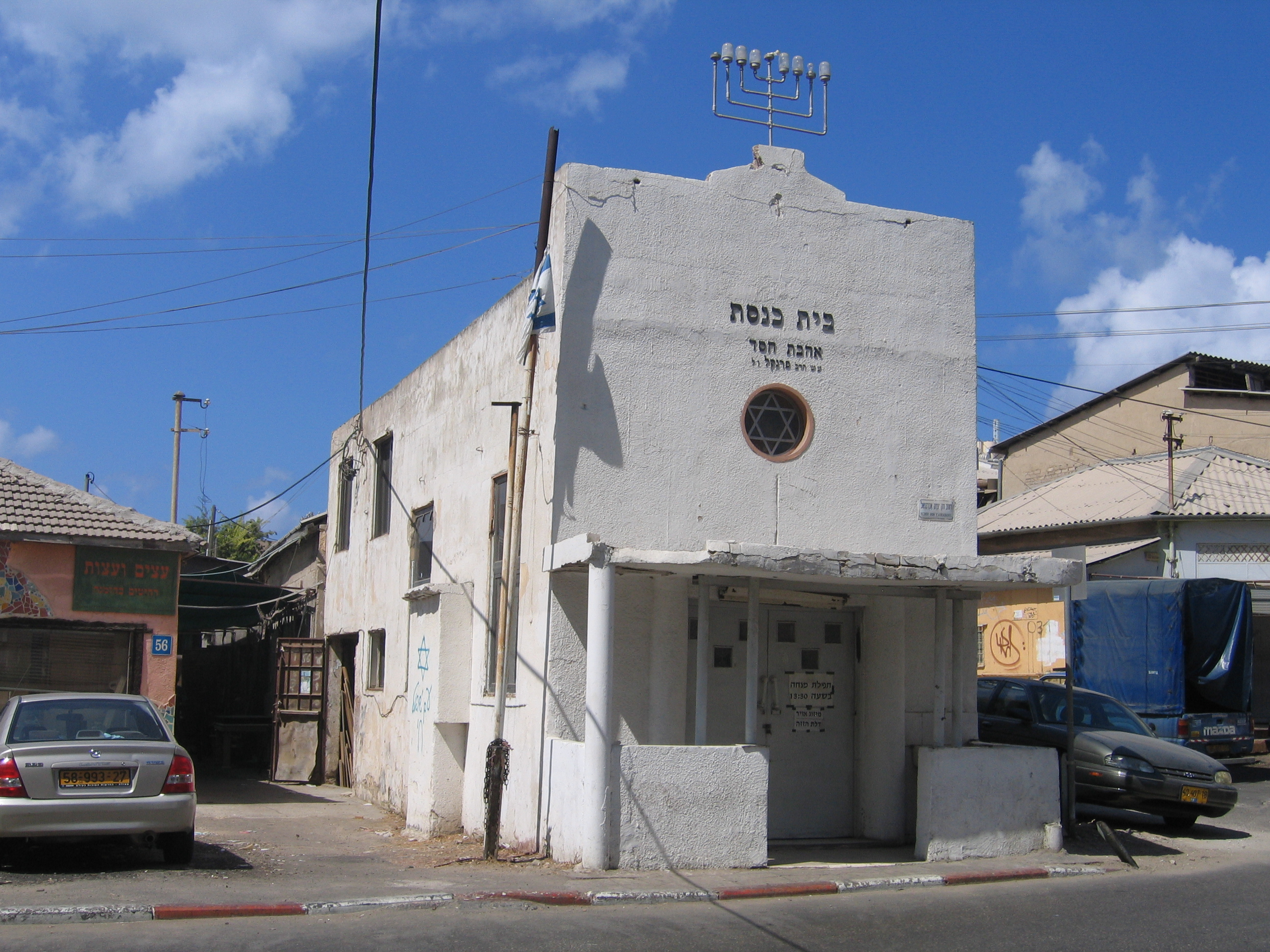 בית כנסת "אהבת חסד" ברחוב פרנקל, תל אביב-יפו